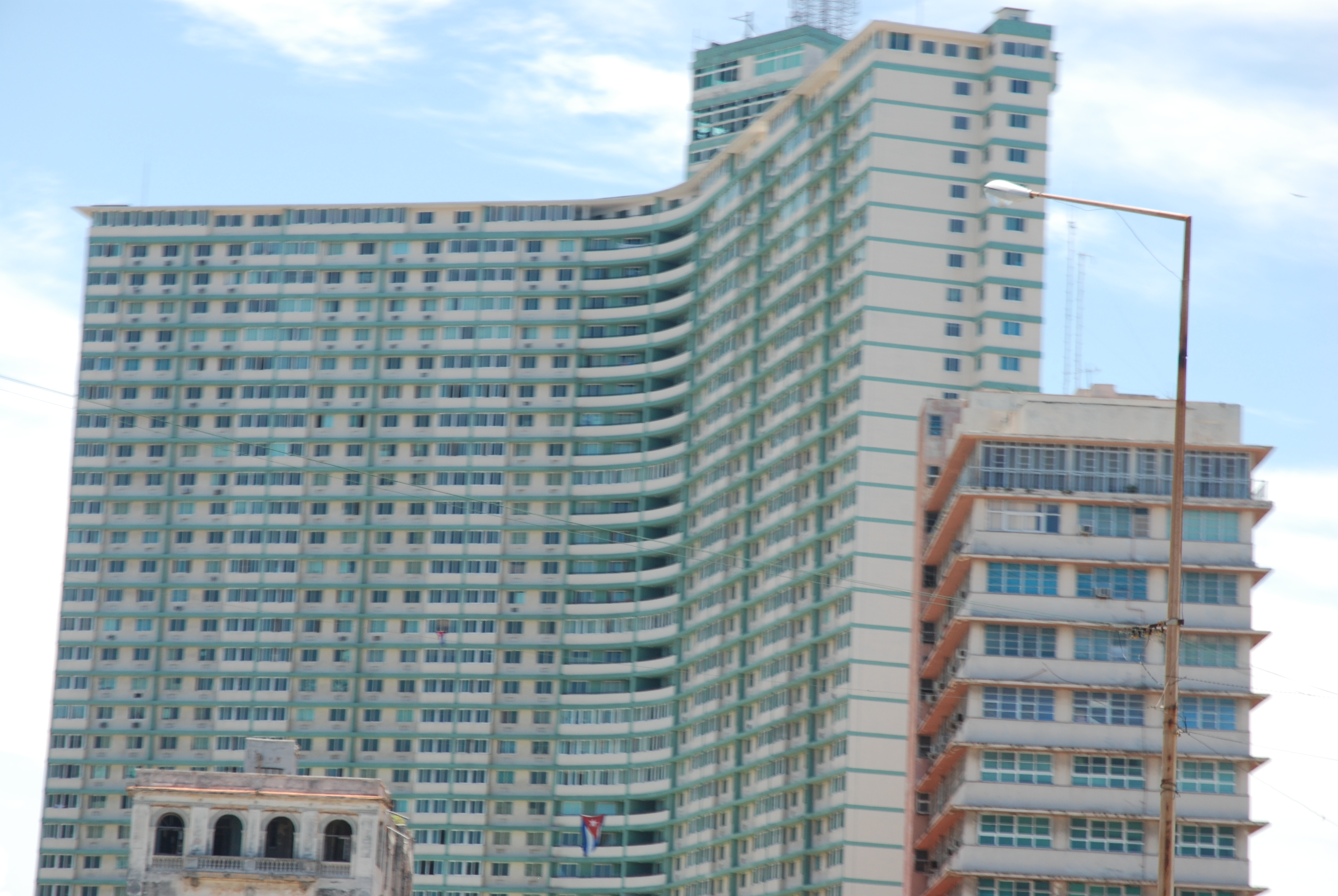 "Edificio Focsa" La Habana, Cuba